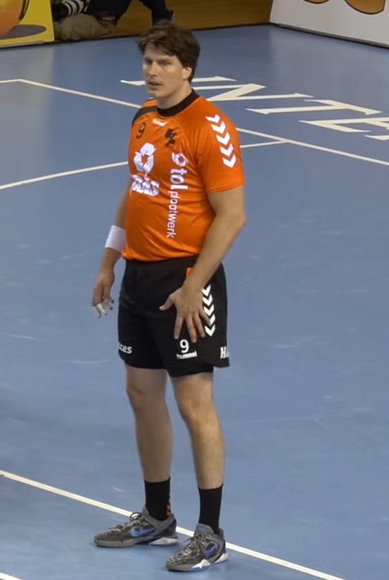 OCI-Nitrogen LIONS wint de nationale handbalbeker, Joey Duin